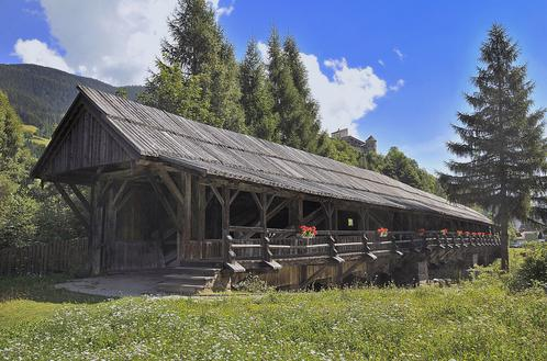 Das Bild zeigt die Bannbrücke (ugs. Punnbrugge) in Panzendorf / Heinfels